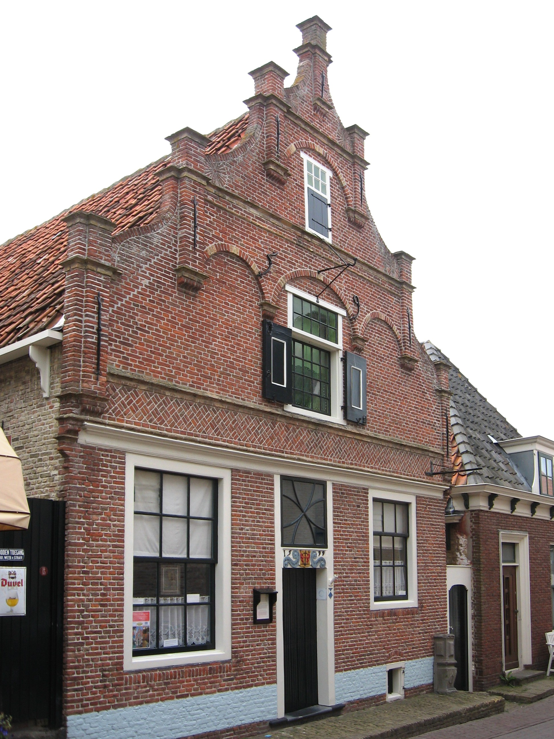 Den Burg - Kogerstraat 1